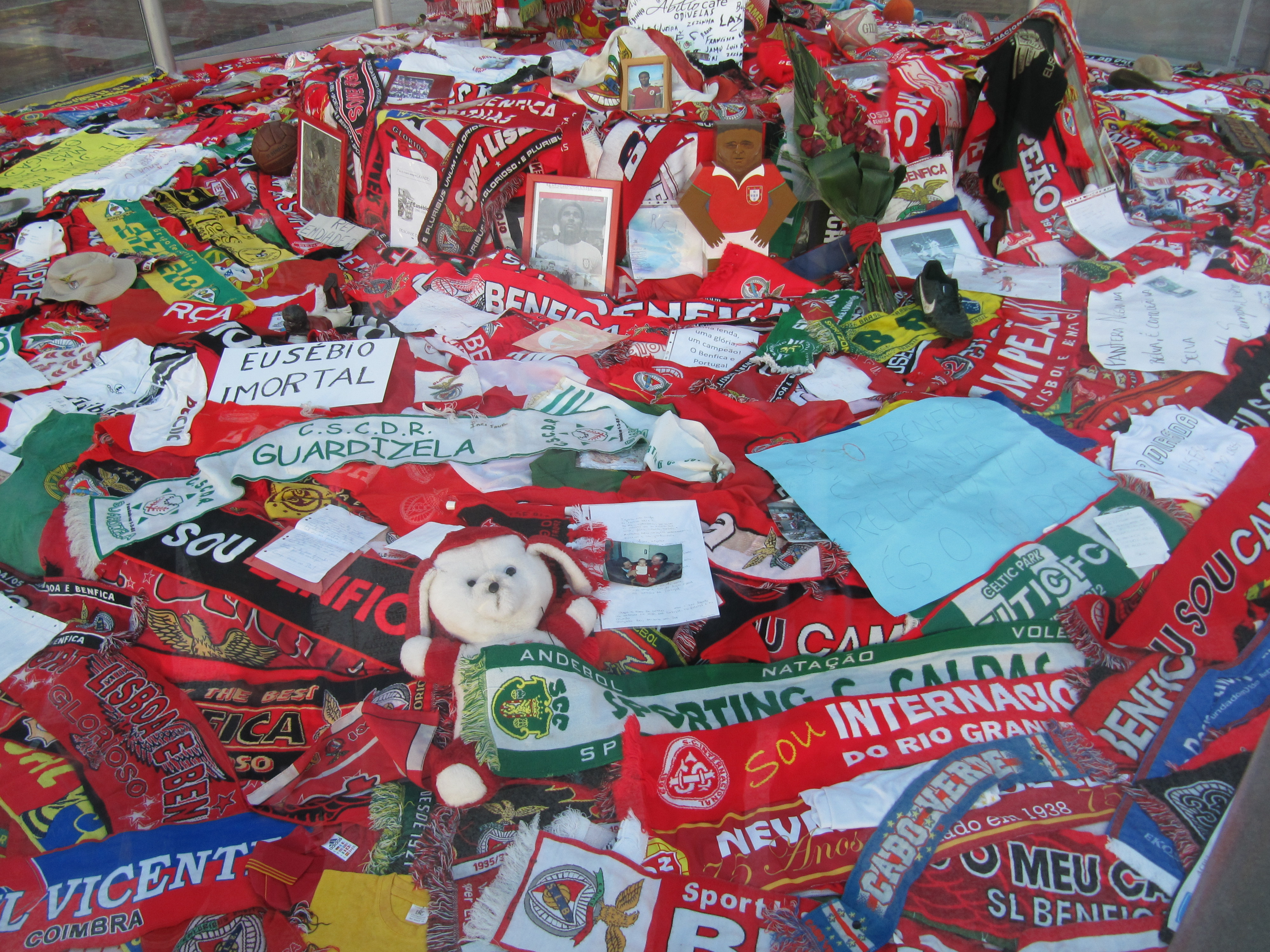 Estádio da Luz